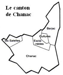 Le canton de Chanac Image personnelle